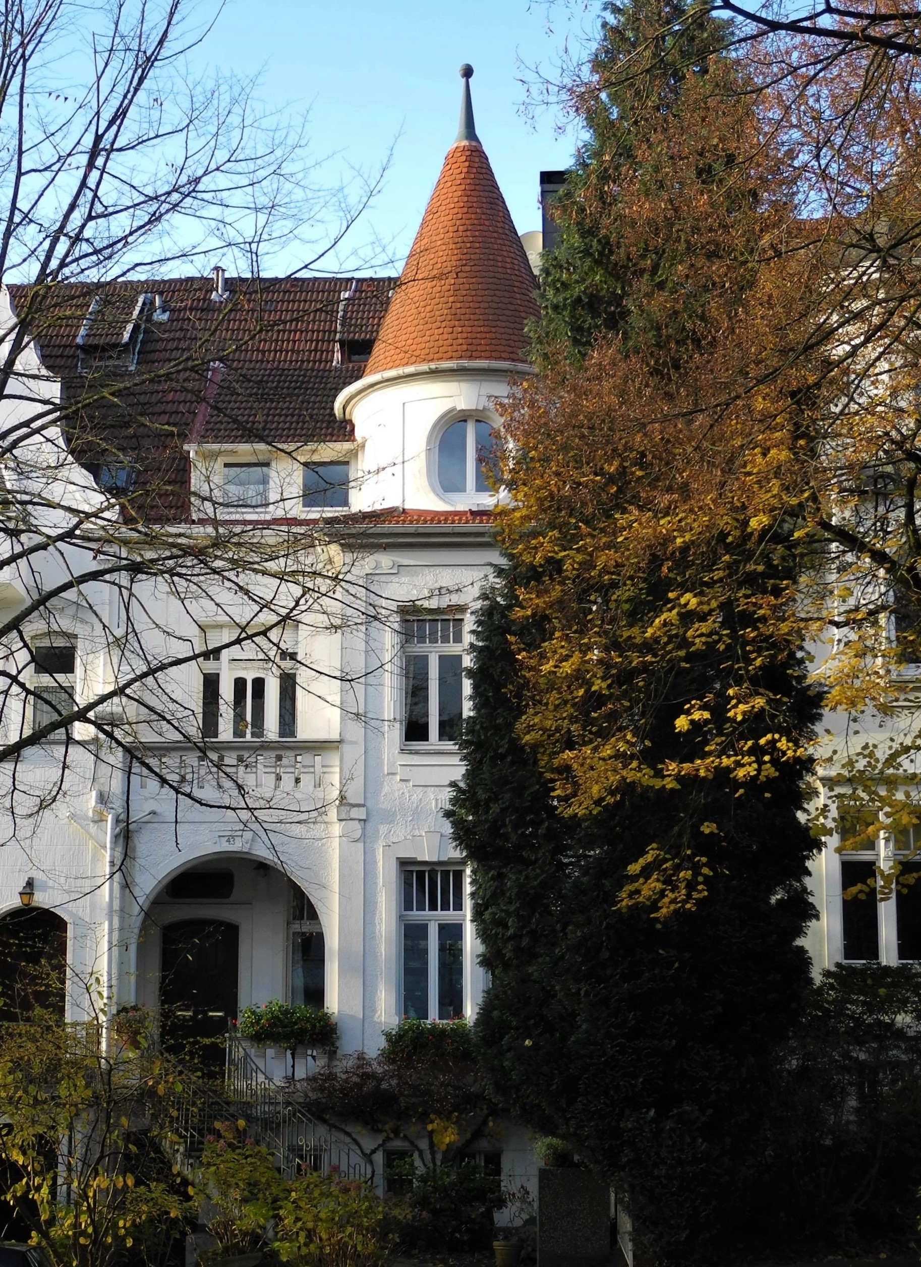 Wuppertal, Wohnquartier Zoo, Kaiser-Wilhelm-Allee 43